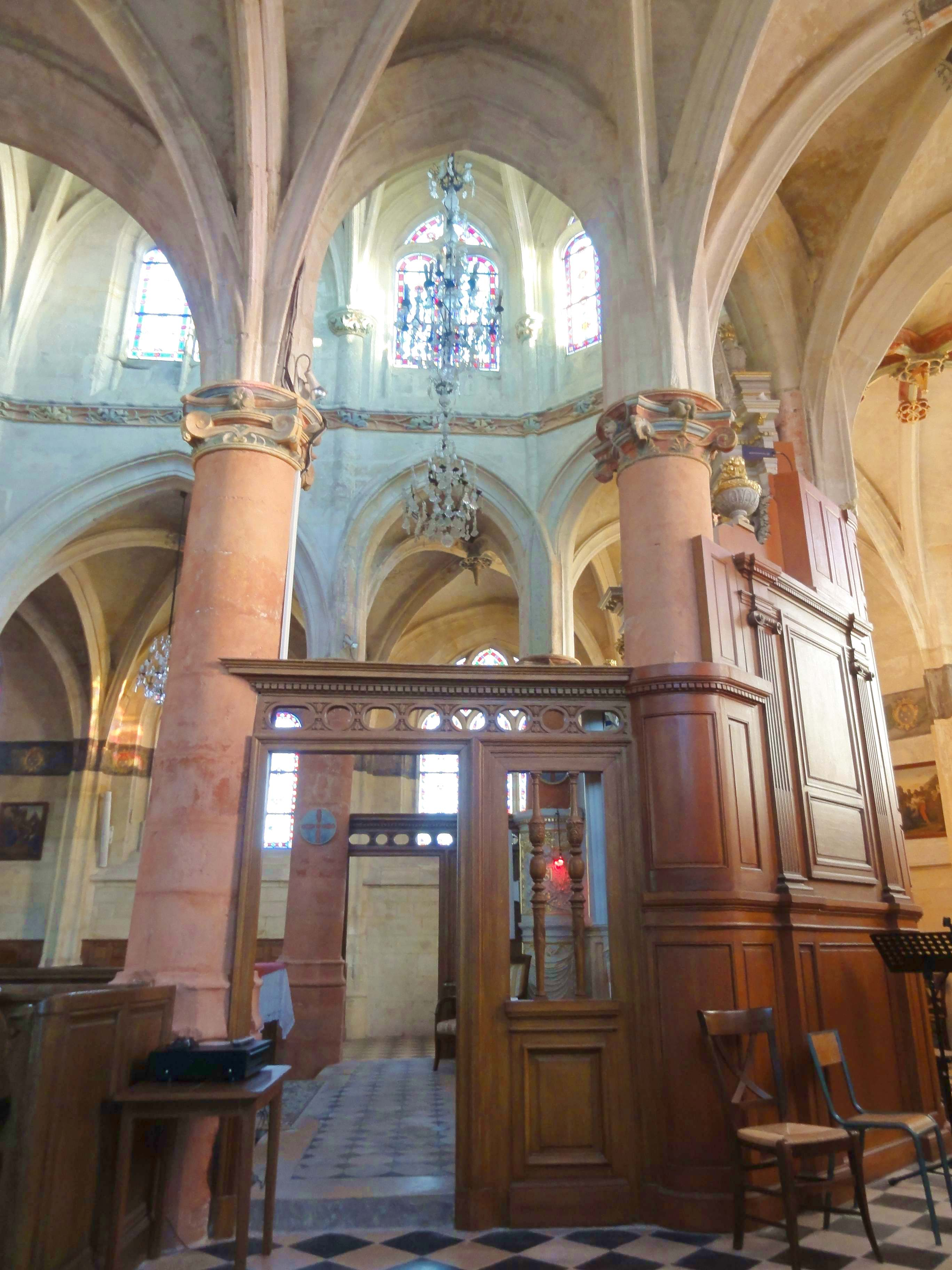 Intérieur de l'église - voir titre.